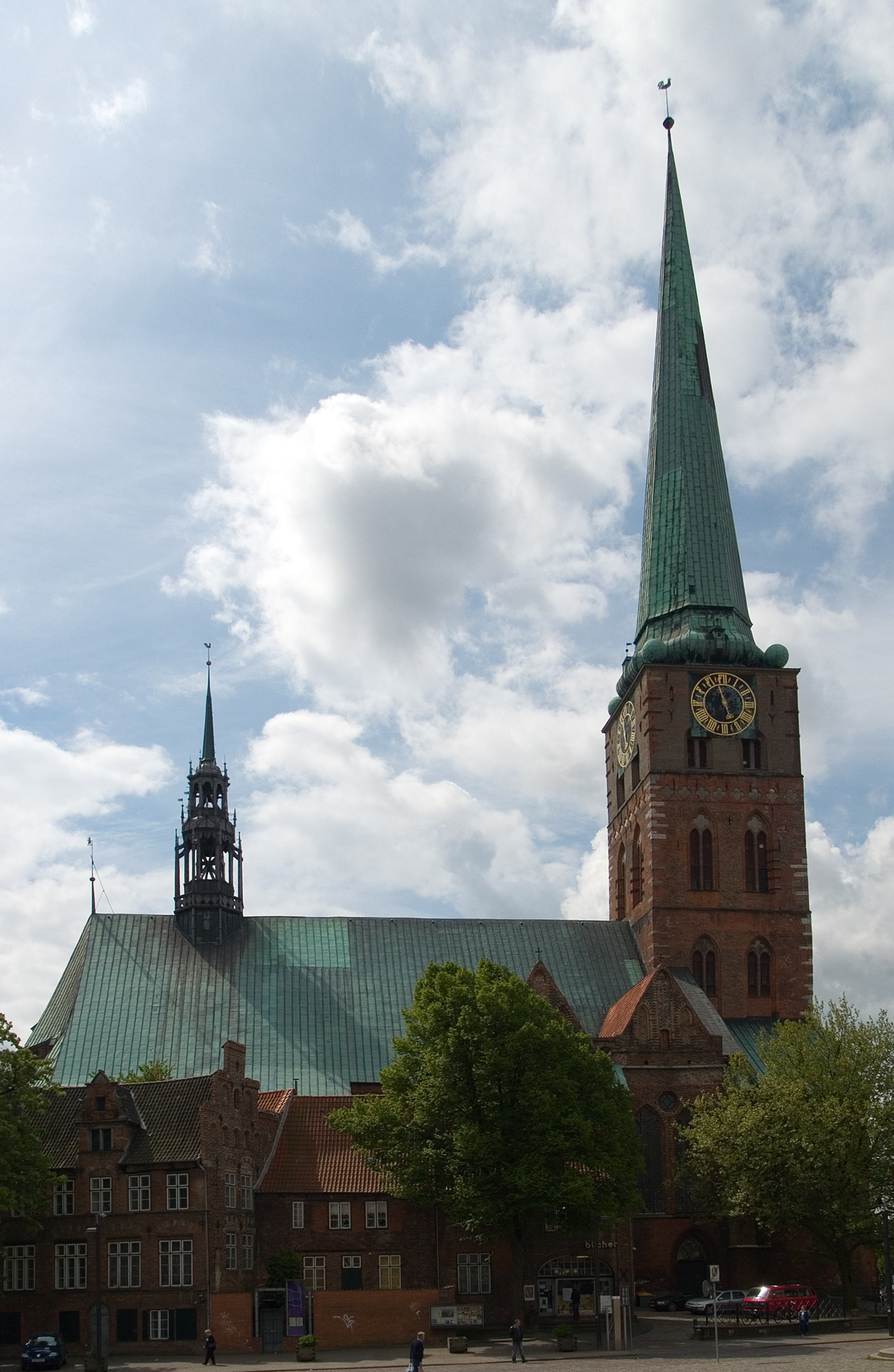 St. Jakobi, Kirchenschiff und Turm, Nordseite